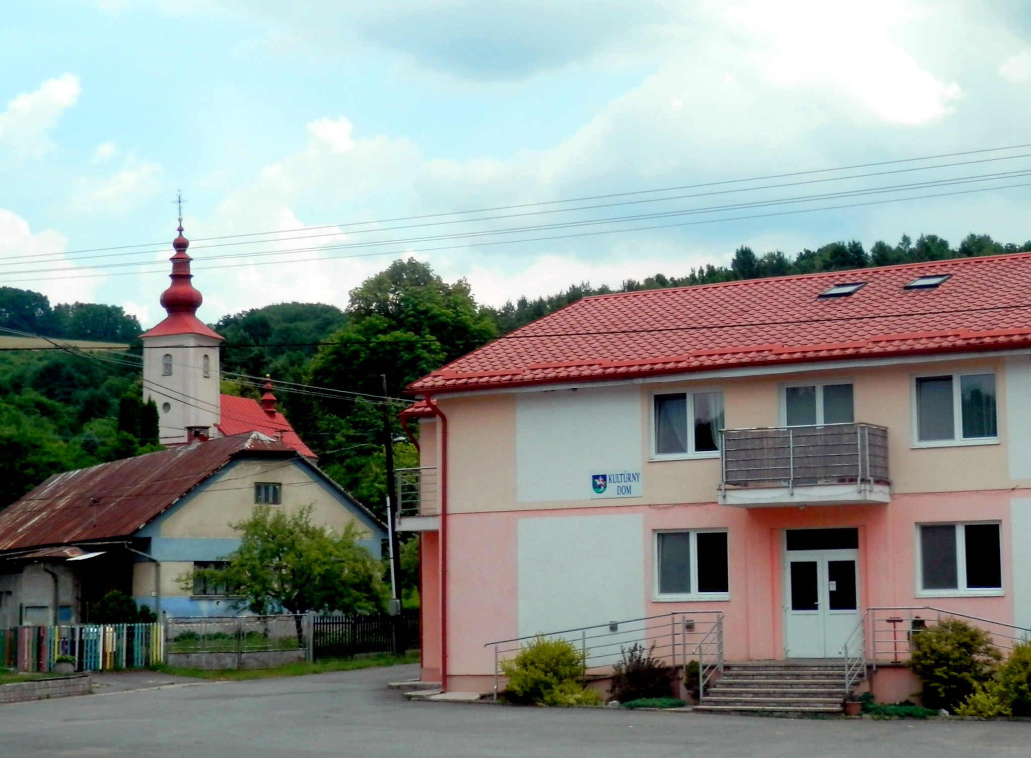 Národná kultúrna pamiatka, pamiatkový objekt kostol svätého Martina. Doba vzniku rok 1828 Prevládajúci sloh klasicizmus. Obec Sveržov, okres Bardejov.